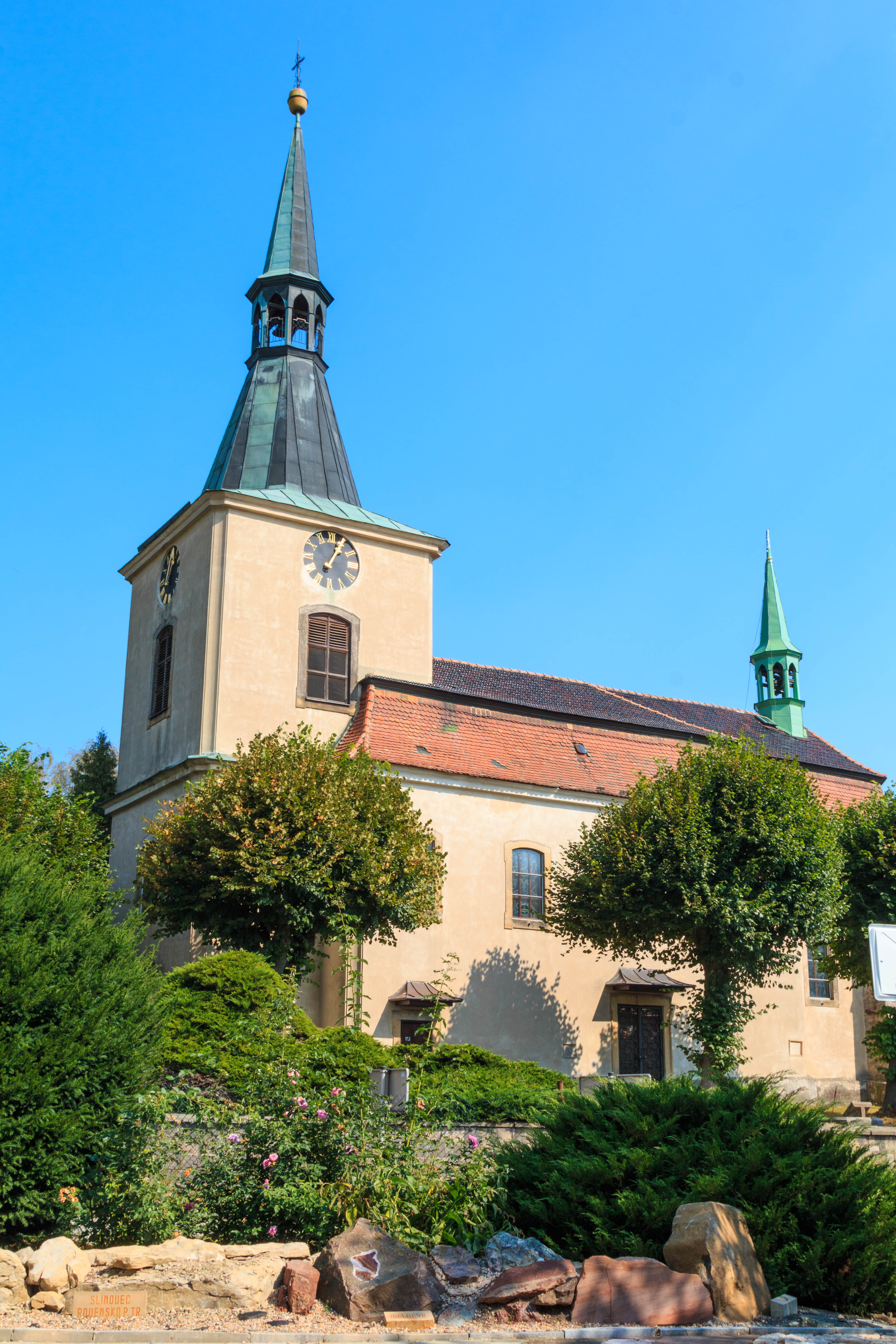 Kostel svatého Martina, u komunikace ve směru Trutnov-Jičín, Libuň.